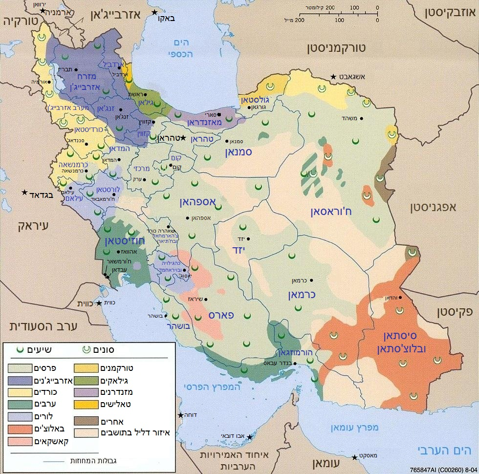 מפה אתנית-דתית של מחוזות איראן